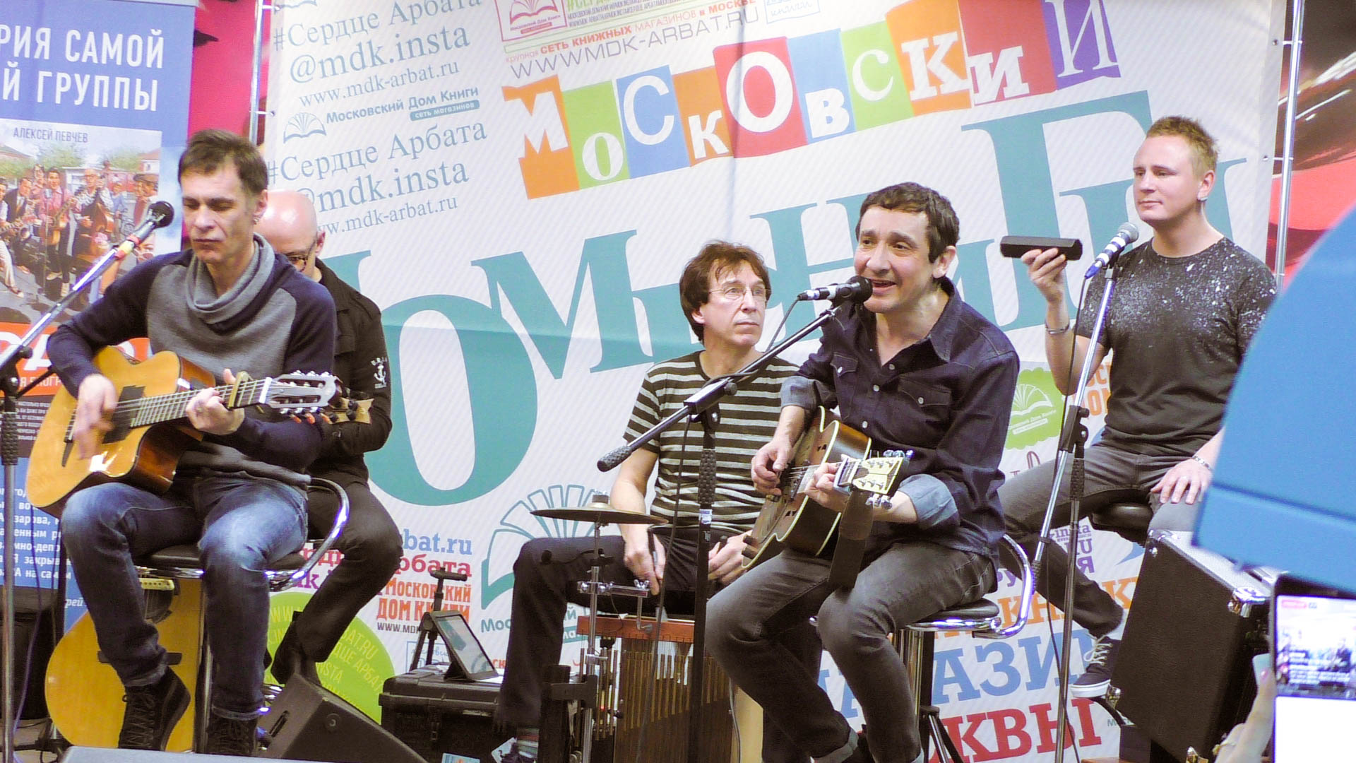 Группа "Браво" в Московском доме книги 20.04.2017.